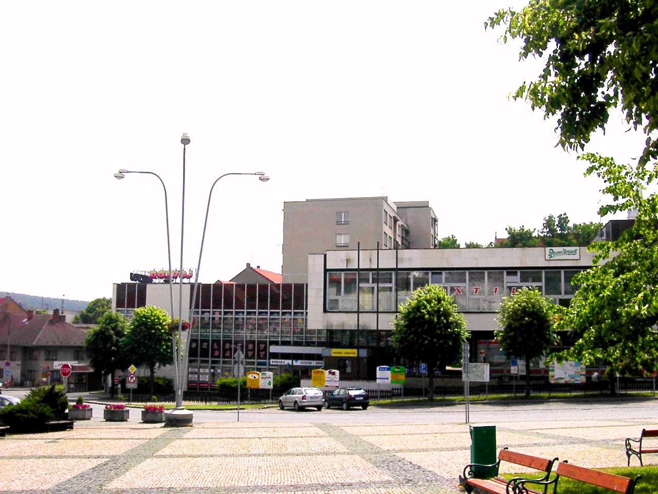 Obchodní dům v Sedlčanech (Shopping centre in Sedlčany)